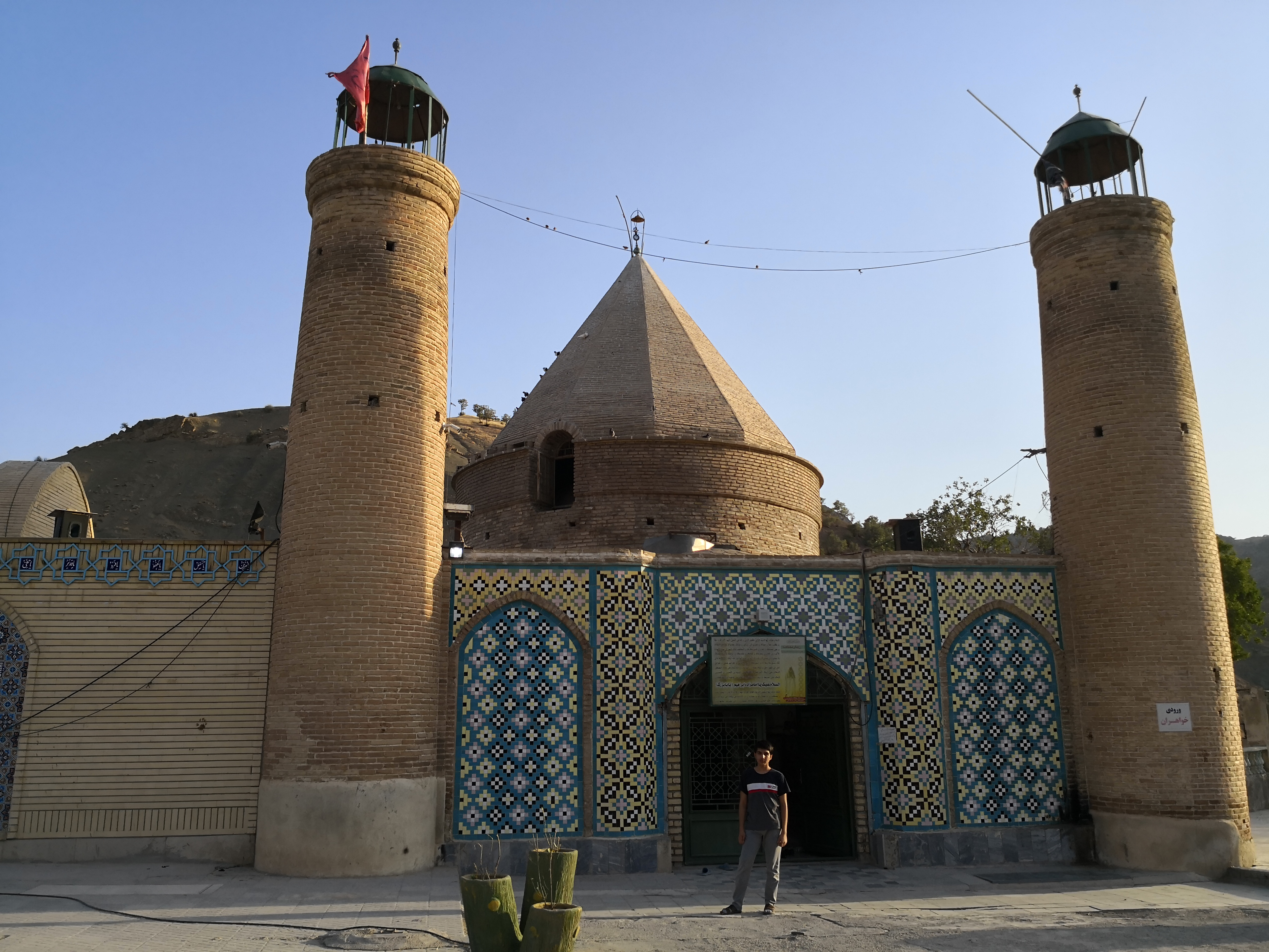 این امام زاده در 53 کیلومتری شهر نوآباد واقع شده است